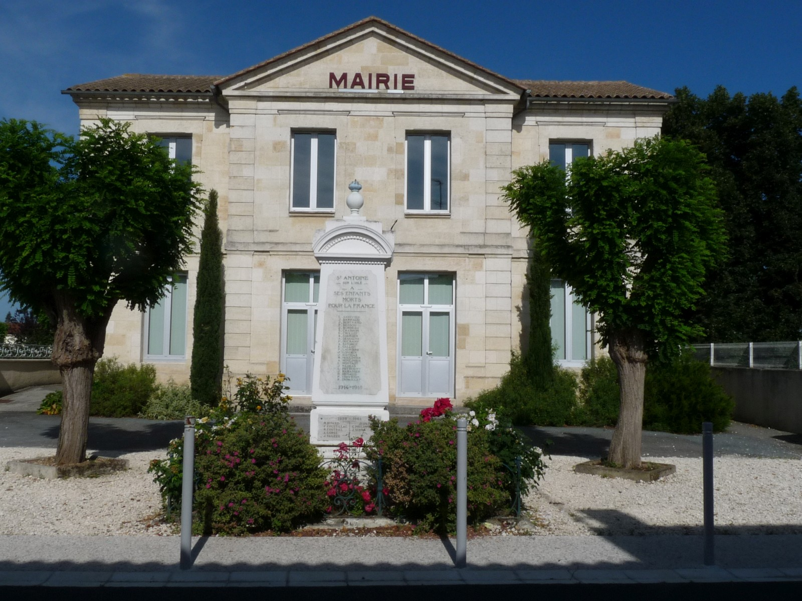 Mairie et monument aux morts de St-Antoine-sur-l'Isle, Gironde, France